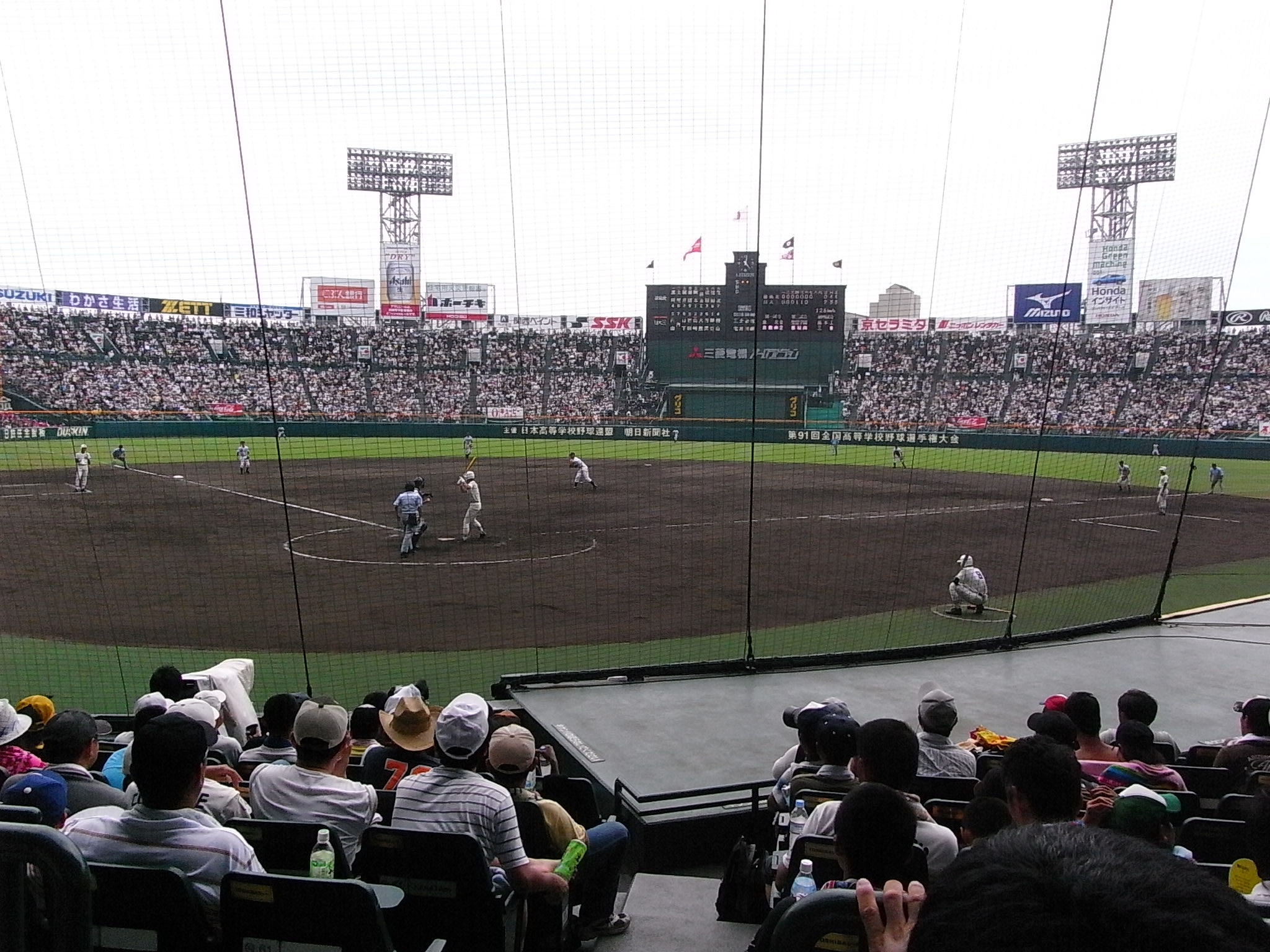 阪神甲子園球場